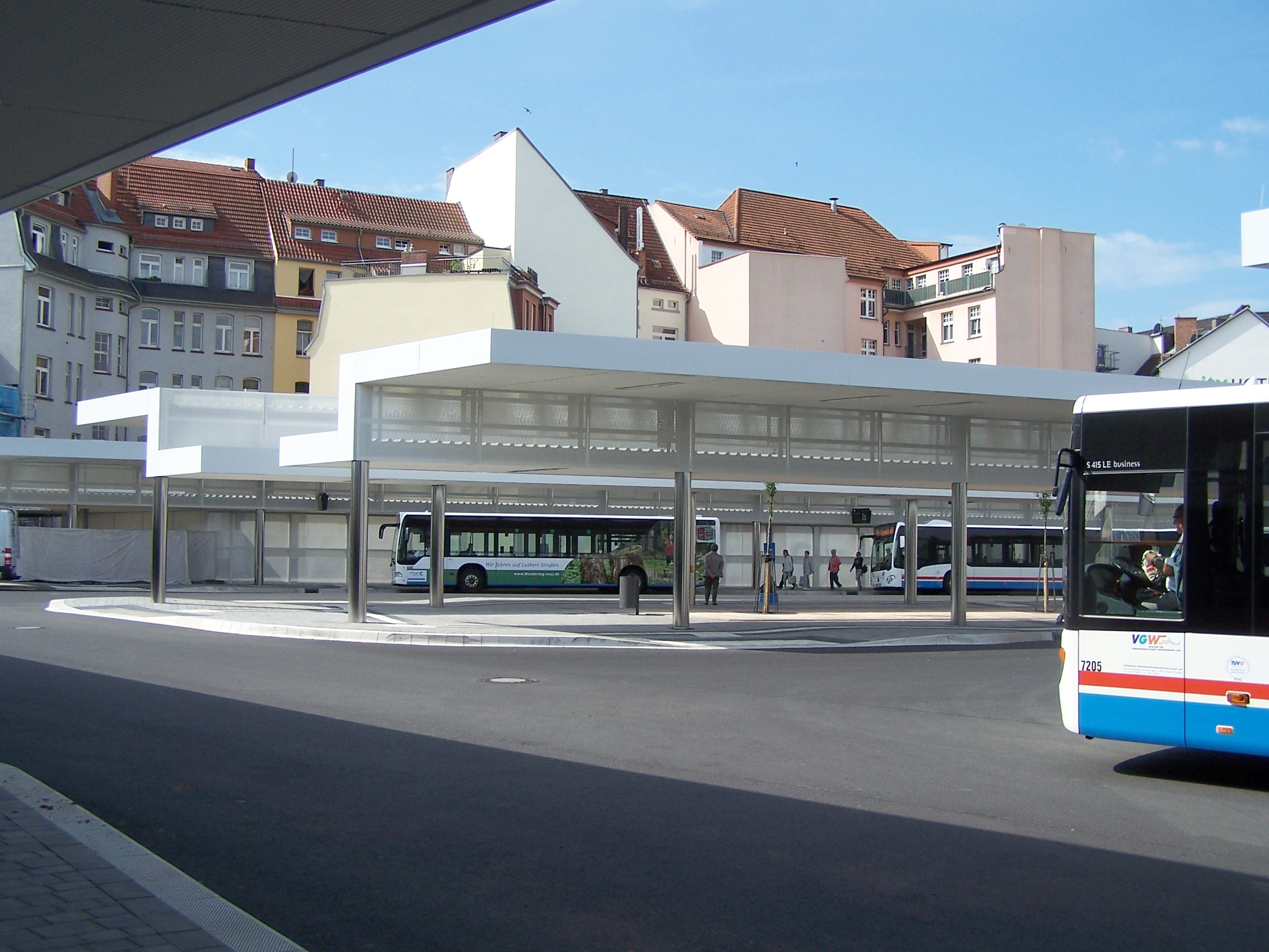 Ansichten des Ende Juni 2017 fertig gestellten Zentralen Omnibusbahnhofs in Eisenach.